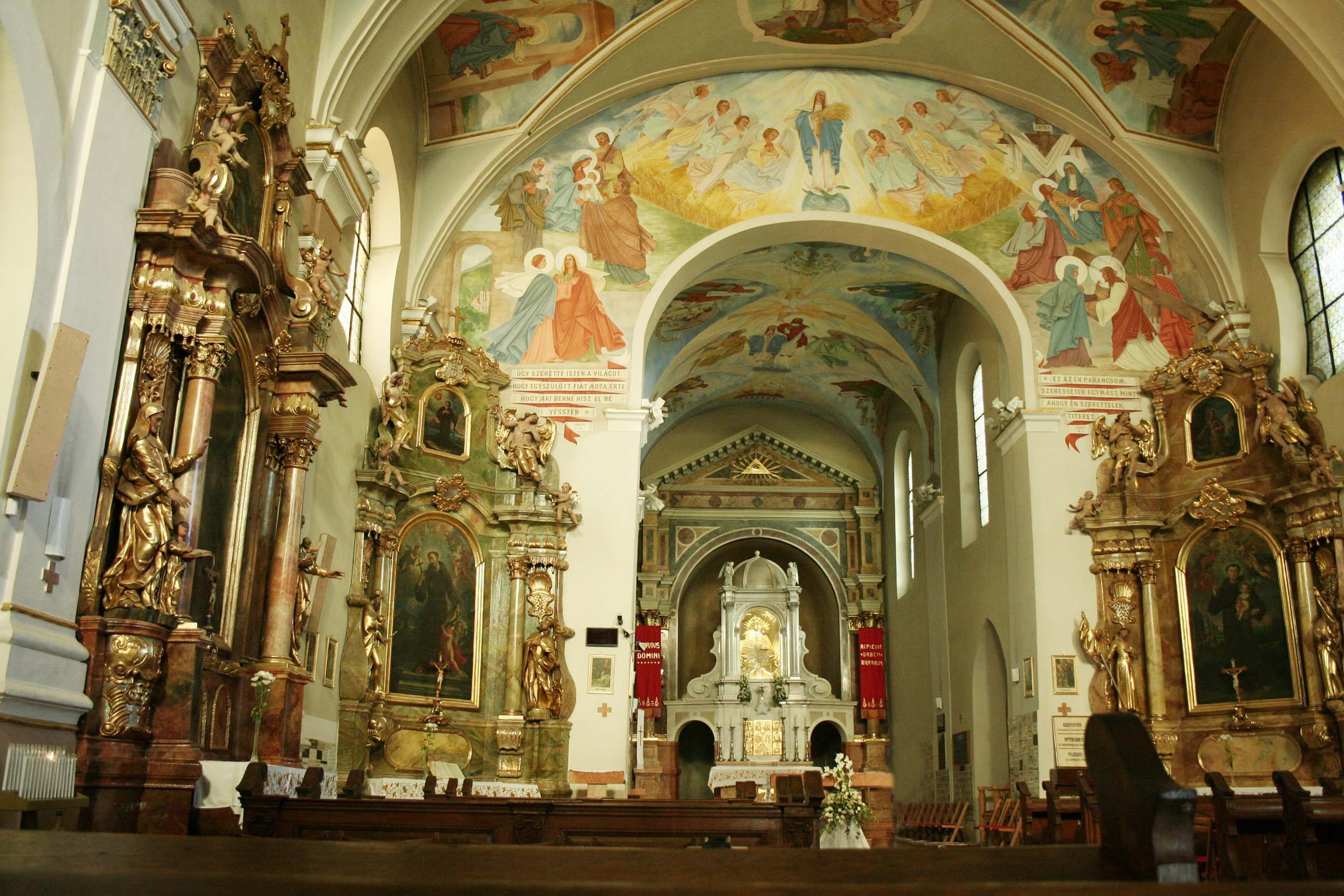 Máriagyüdi templom belső képe